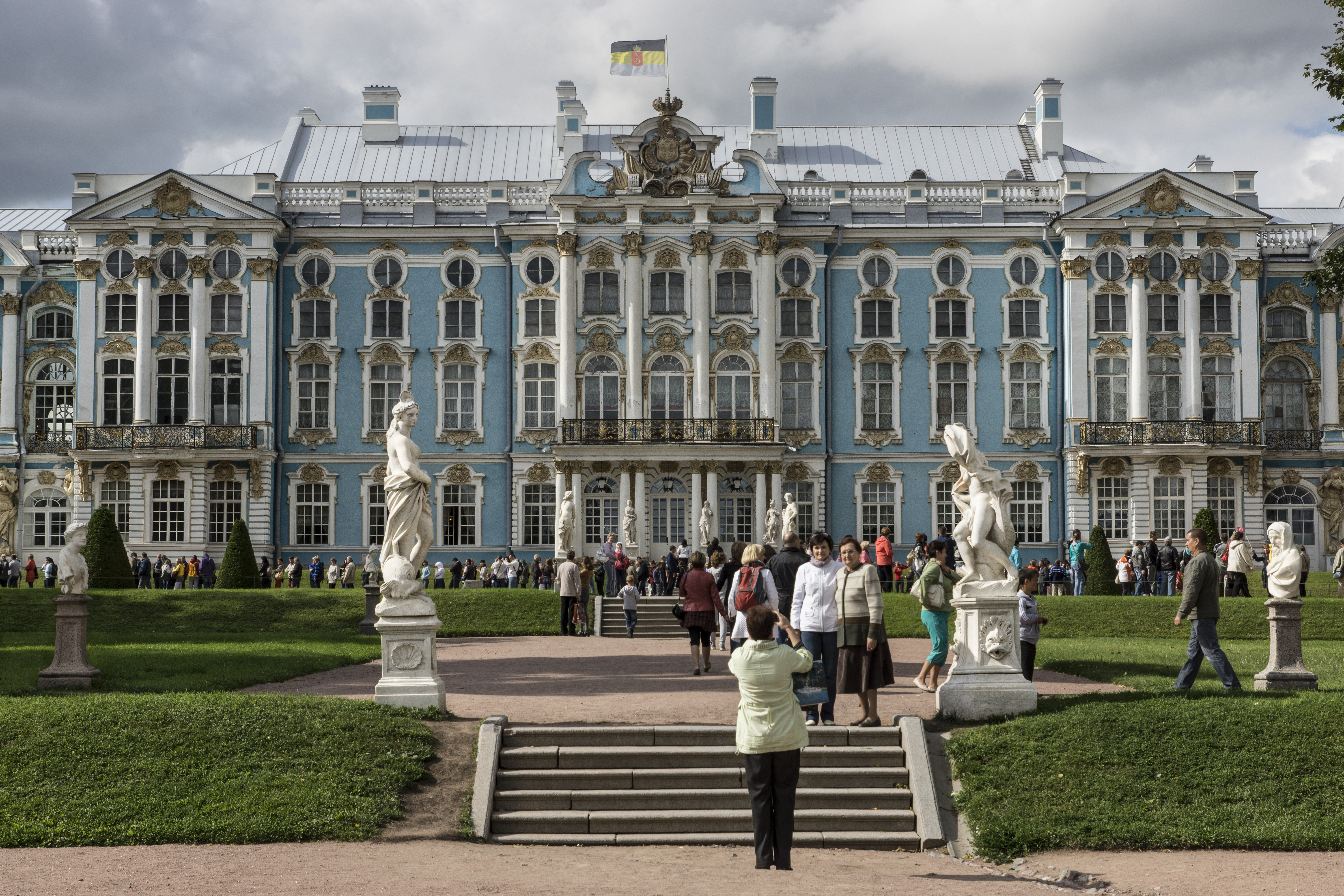 ЕКАТЕРИНИНСКИЙ ДВОРЕЦ (МУЗЕЙ-ЗАПОВЕДНИК "ЦАРСКОЕ СЕЛО")